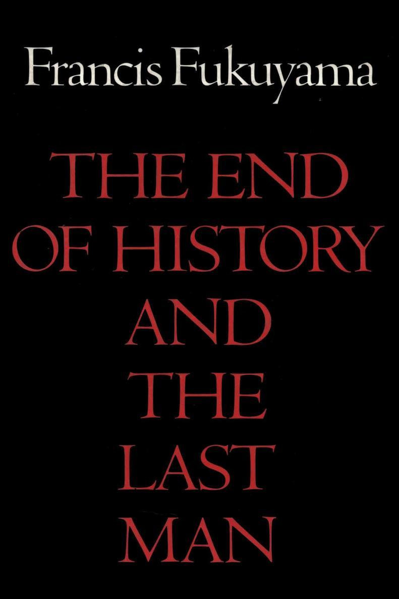 обложка первого издания книги Фрэнсиса Фукуямы "The End of History and the Last Man"